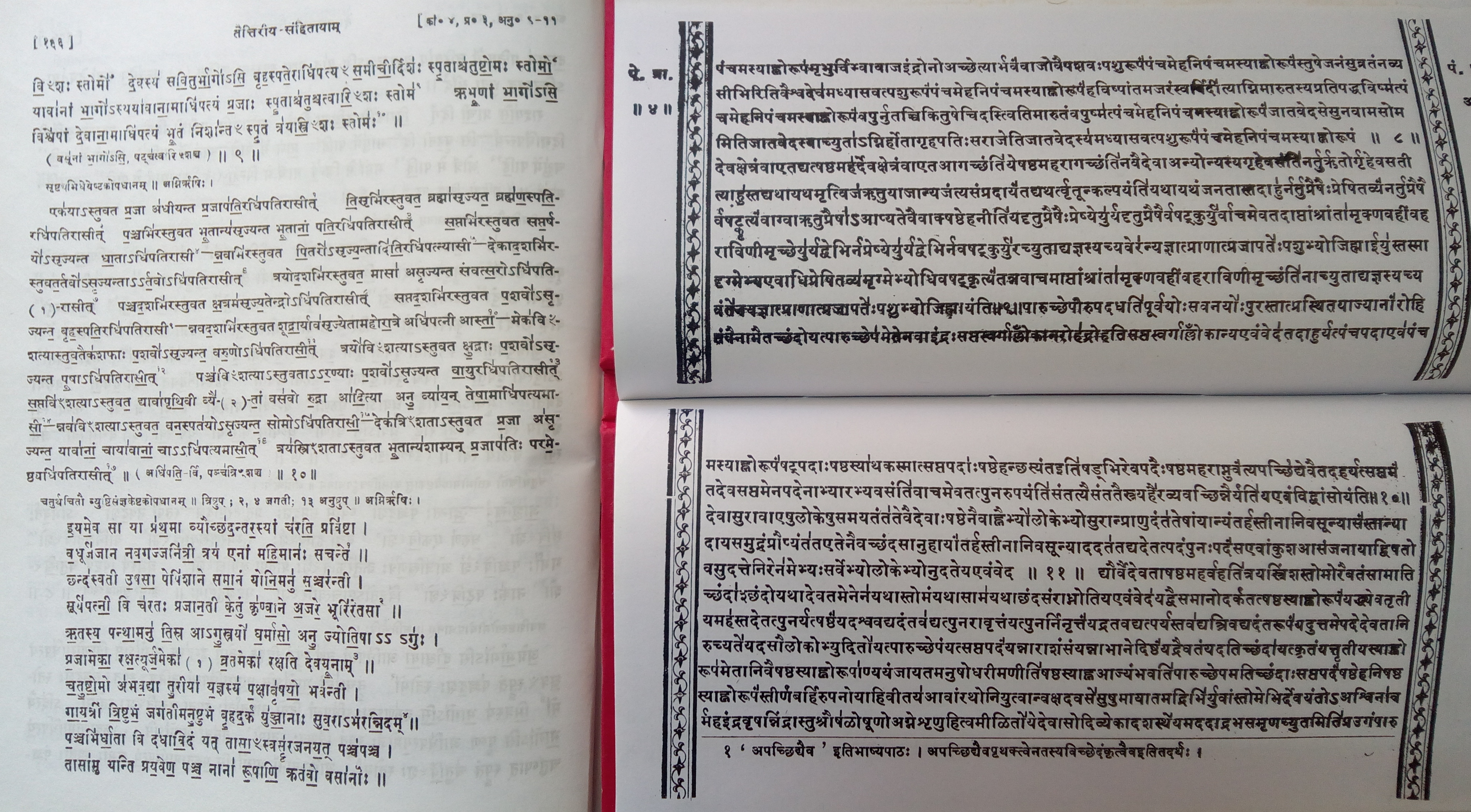 एतरेय और तैत्तिरीय ब्राह्मण । तैत्तिरीय संहिता में मंत्र मोटे अक्षरों में है, जबकि ब्राह्मण भाग छोटे अक्षरों में ।